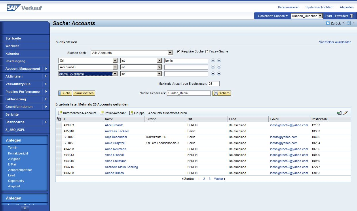 Screenshot von SAP Verkauf. Suchseite.